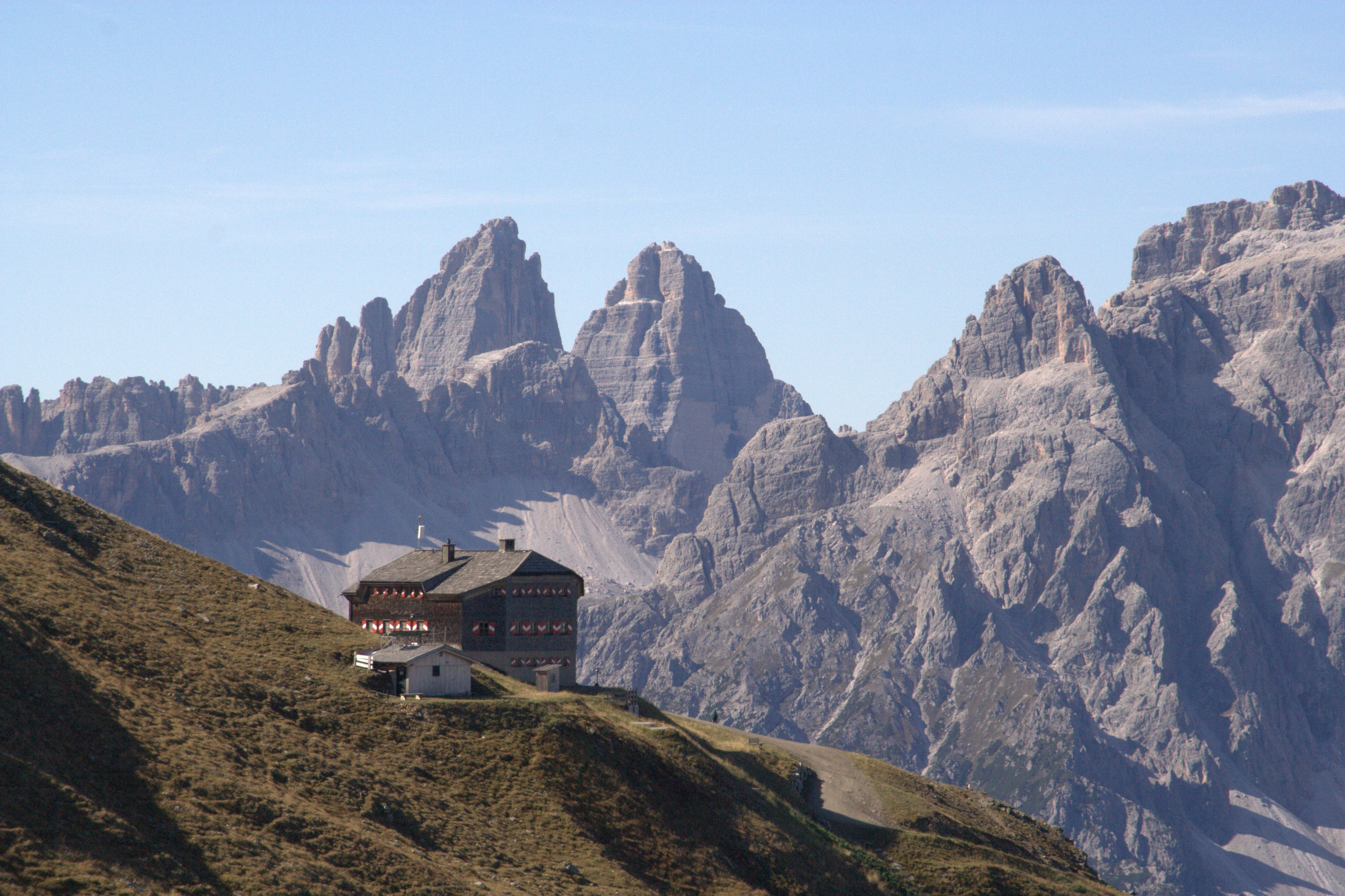 Sillianer Hütte, Blick Richtung Westen auf das UNESCO-Weltnaturerbe der Sextner Dolomiten mit den Drei Zinnen